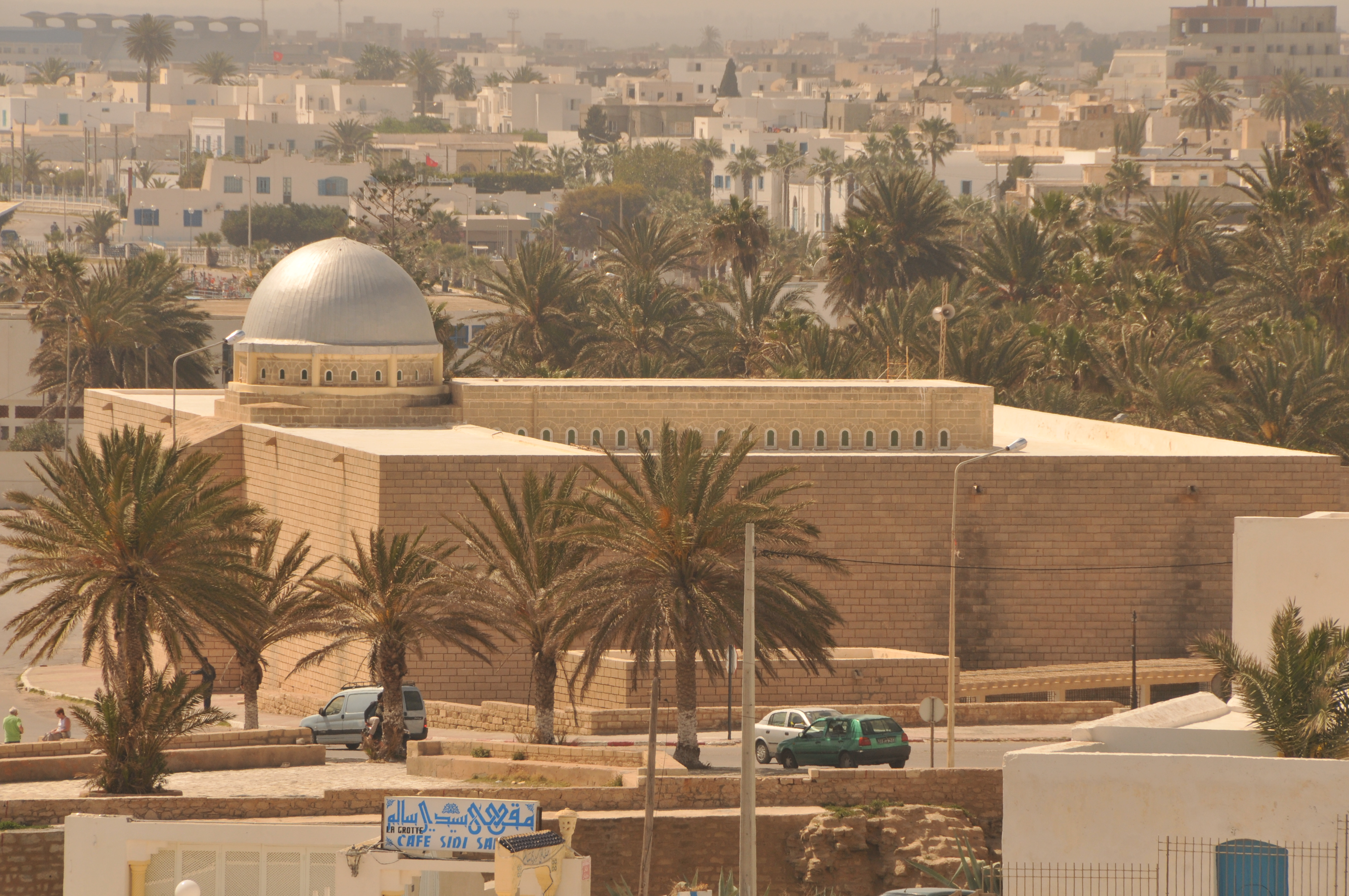 Grande mosquée de Mahdia, vue à partir du toit d'El Borj Kebir, Tunisie